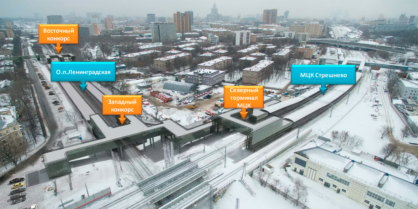 Проект ТПУ